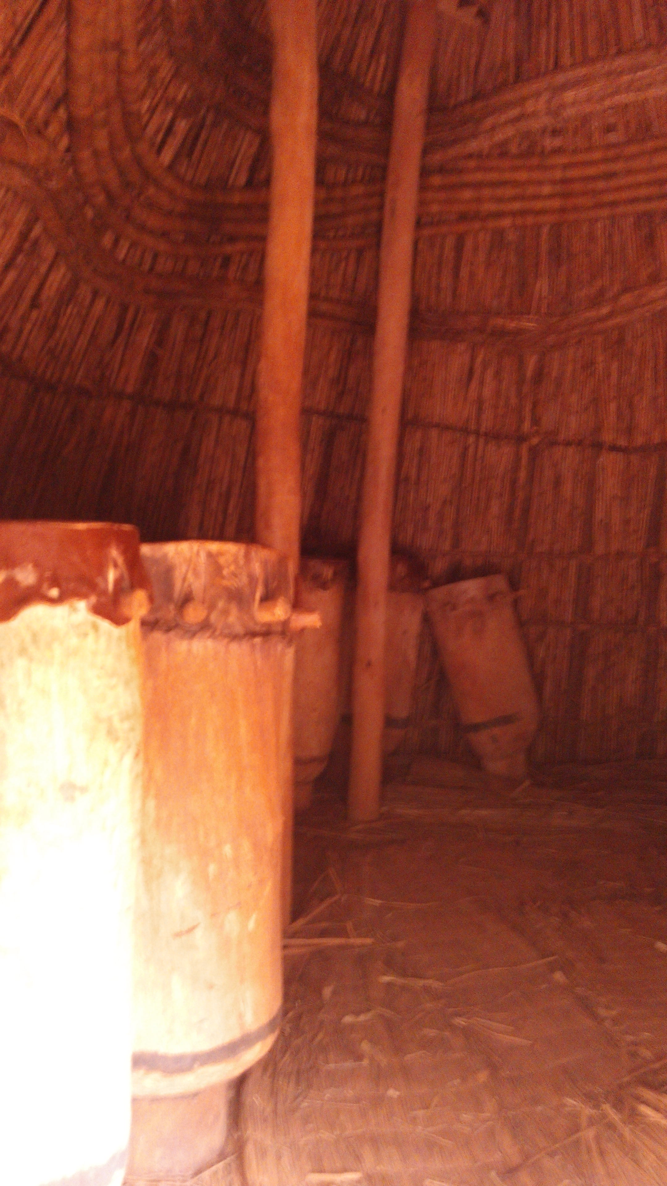 C est une reconstitution de la maison dans laquelle on entreposait les tambours à la cour This is an image of music and dance from Burundi